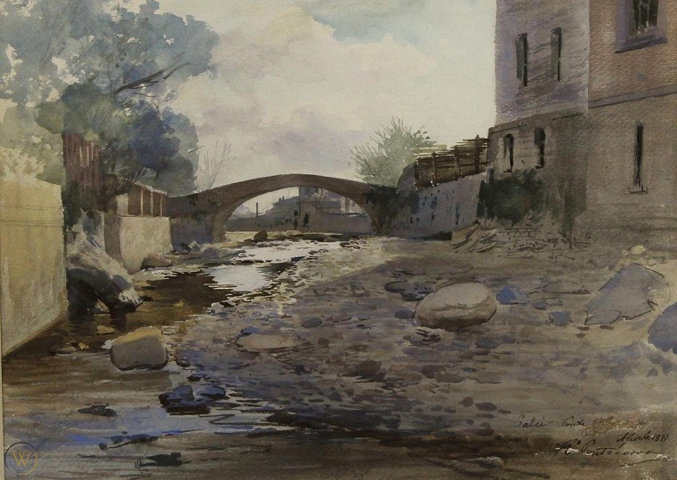 Ponte a Calci, acquarello, 25 x 34 cm., coll. privata